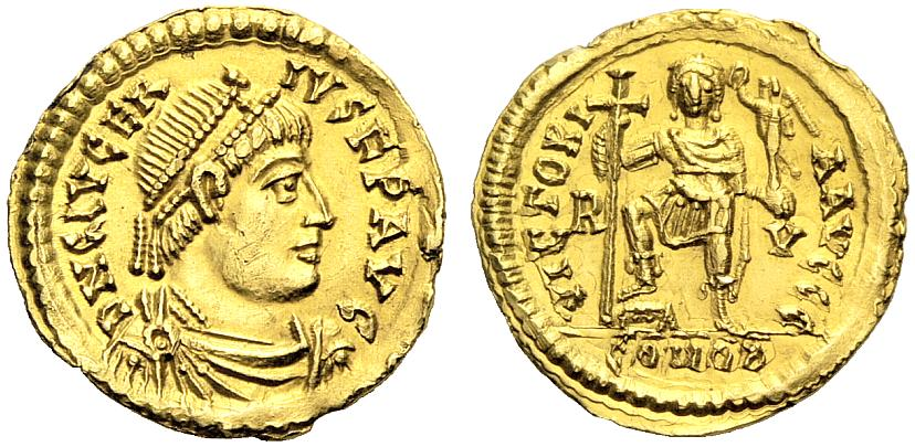 Glycerius, 473-474, Solidus (4,34g), Ravenna. D N GLVCER-IVS F P AVG, Büste mit Perlendiadem, Drapierung und Kürass nach rechts. Rv.: VICTORI-A AVGGG / R - V (in den Feldern) / COM OB (im Abschnitt), Kaiser mit Stabkreuz und Victorienglobus von vorn, setzt rechten Fuß auf Podest. RIC 3103 (R4), C 3 (350 Fr.), Lacam -.